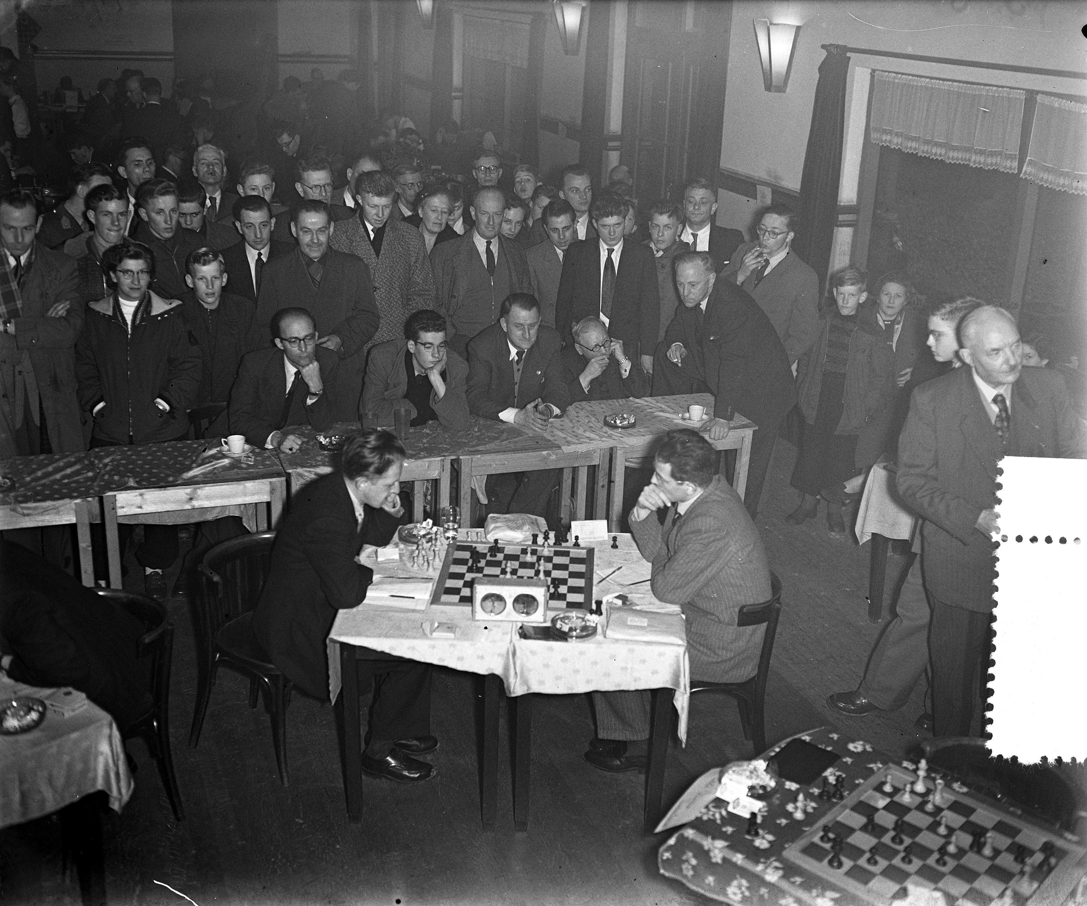 Collectie / Archief : Fotocollectie Anefo Reportage / Serie : [ onbekend ] Beschrijving : Hoogovenschaaktoernooi partij Milic tegen Perez Datum : 16 januari 1955 Trefwoorden : PARTIJEN Persoonsnaam : Perez Instellingsnaam : Hoogovenschaaktournooi Fotograaf : Pot, Harry / Anefo Auteursrechthebbende : Nationaal Archief Materiaalsoort : Glasnegatief Nummer archiefinventaris : bekijk toegang 2.24.01.09 Bestanddeelnummer : 906-9420